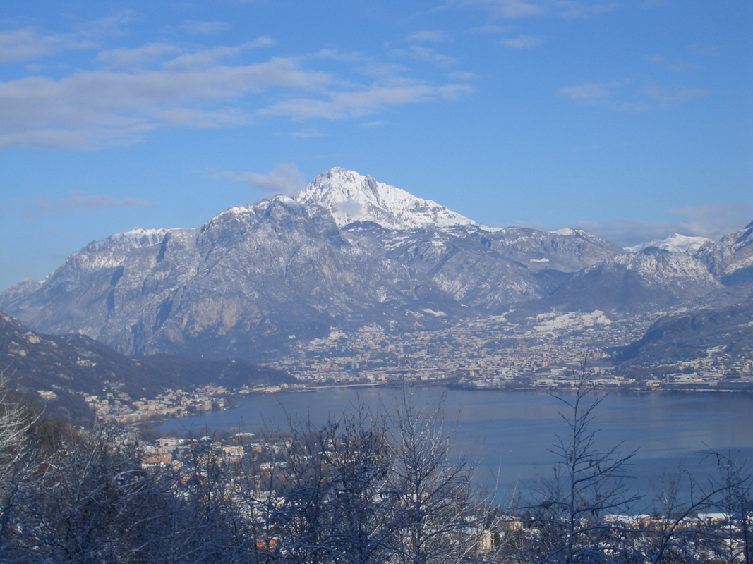 La Grignetta, Lecco ed il lago di Garlate; fotografia scattata da Consonno il 26 dicembre 2008.